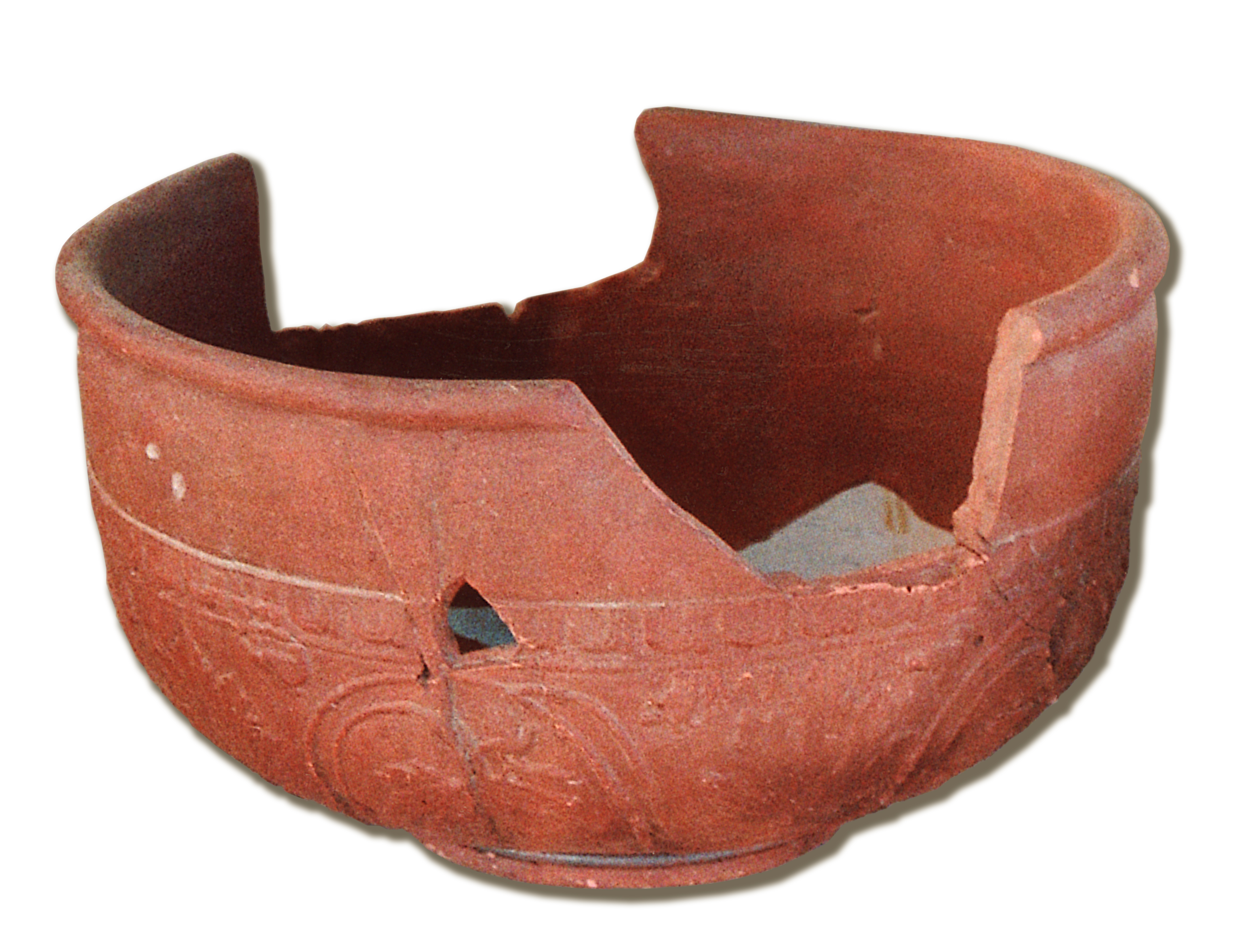 Villa Rustica Leutstetten, Oberbayern: Eine Terra Sigillata-Schüssel des in der Forschung bekannten südgallischen Großtöpfers Cinnamus, der etwa zwischen 135 und 170 in Lezoux produzierte.